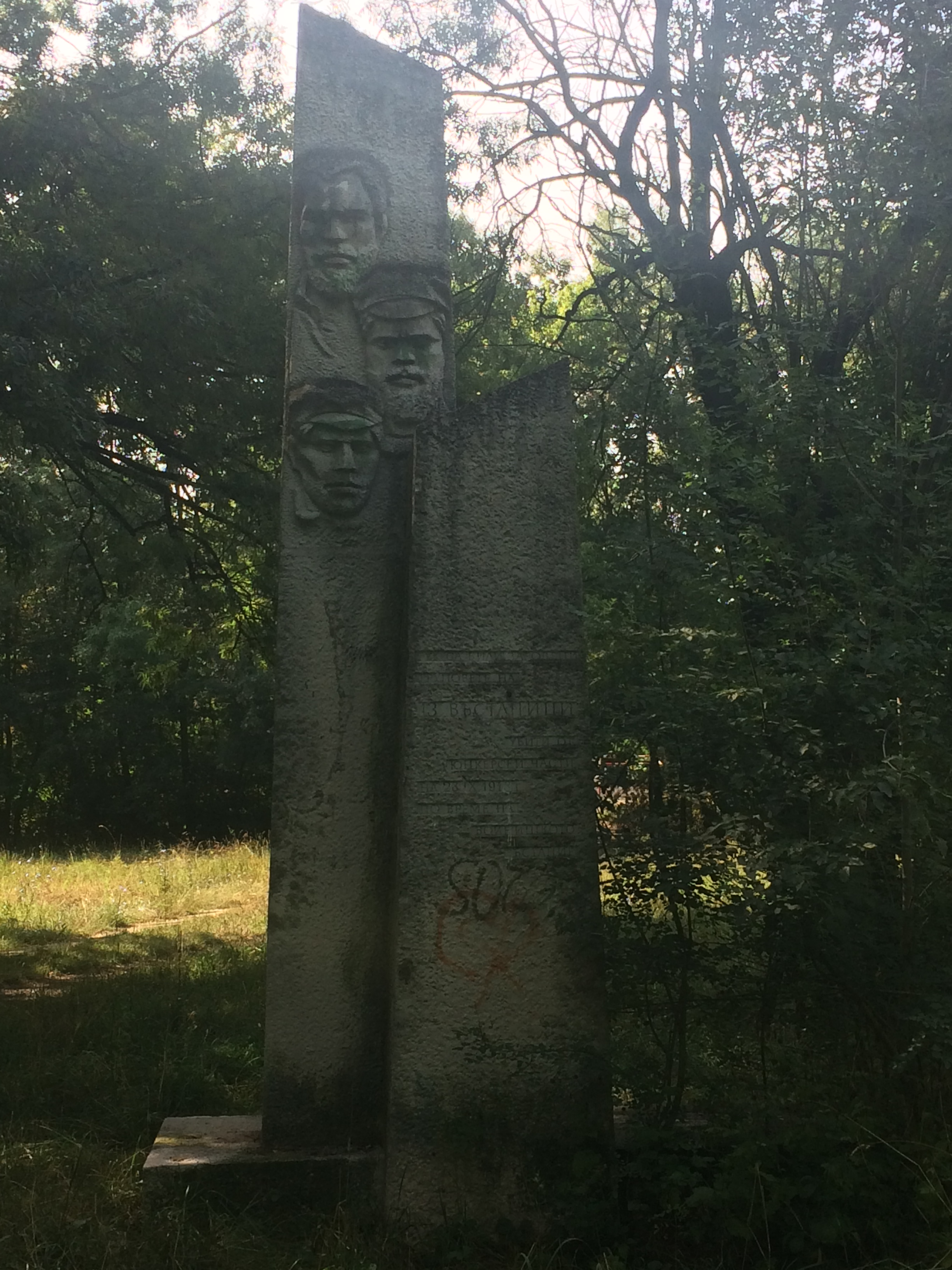 Паметник на 13 въстаници от Владайското въстание в Западния парк (край Захарна фабрика), София